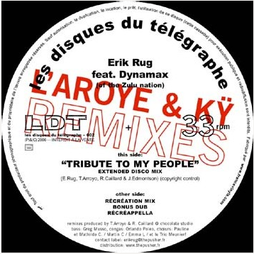 Label